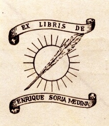 Exlibri de Enrique Soria Medina